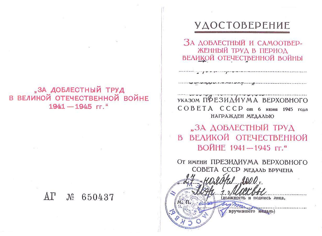 Удостоверение к медали "За доблестный труд в Великой Отечественной войне 1941-1945 гг." ("российский" вариант).